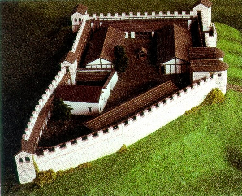 Reiterkastell Vemania